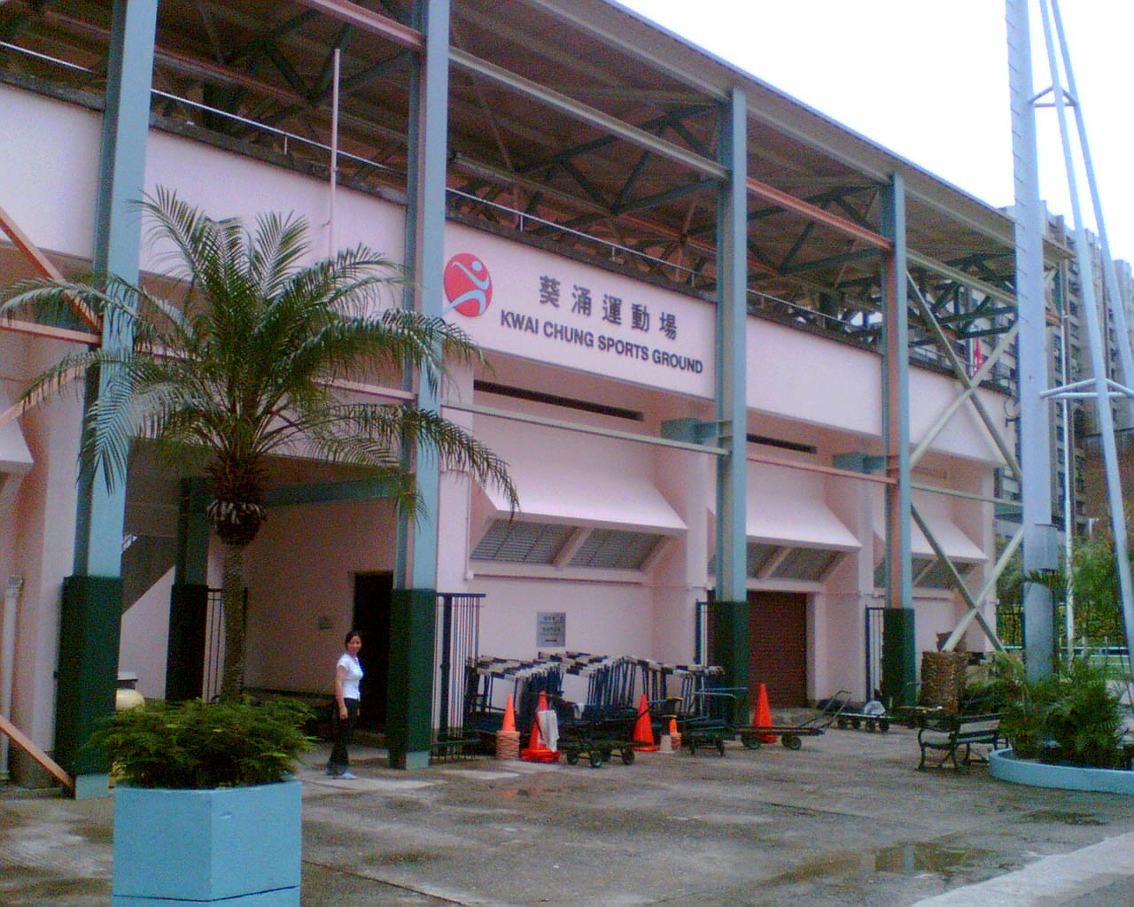 葵涌運動場